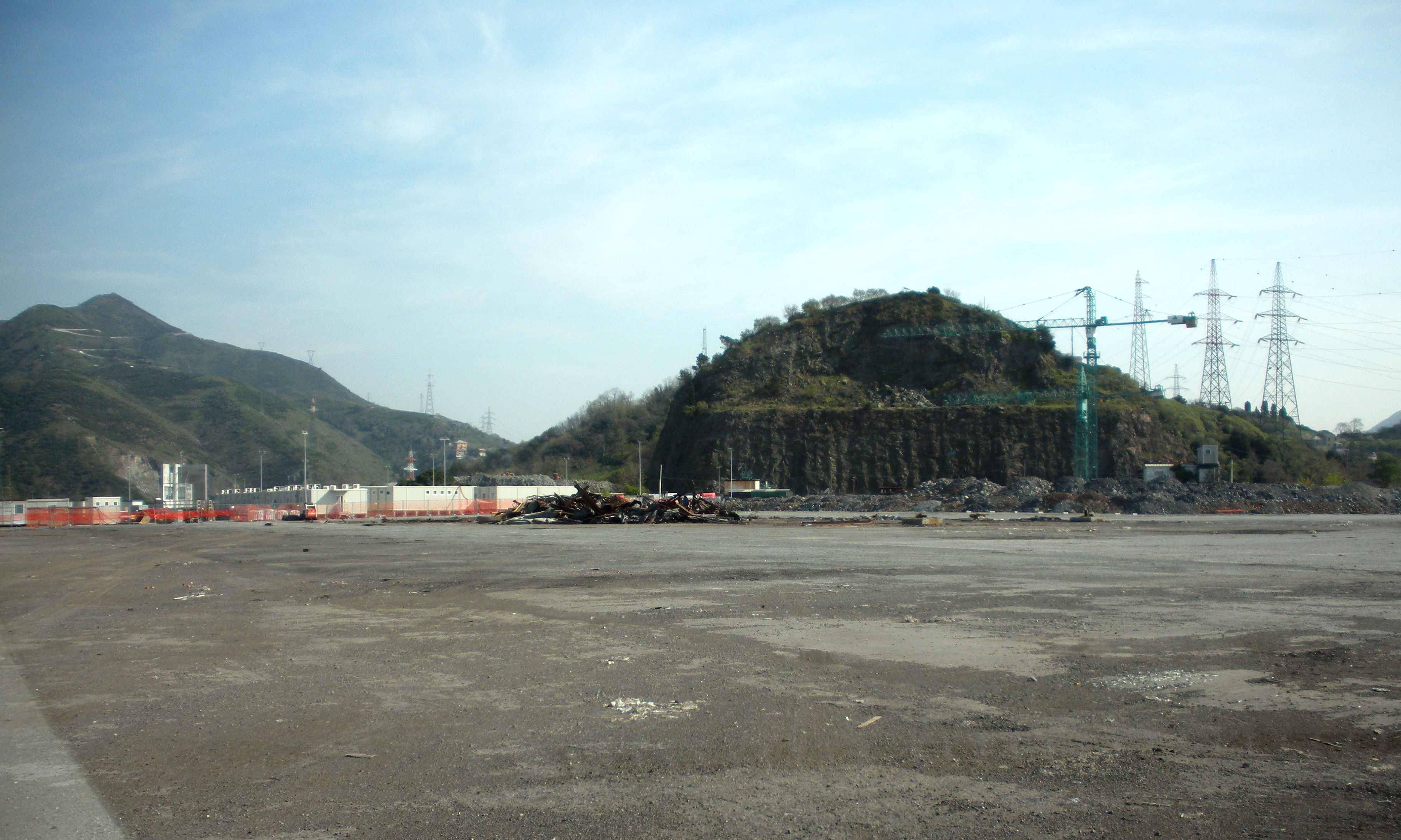 Genova-Cornigliano, spianata Erzelli